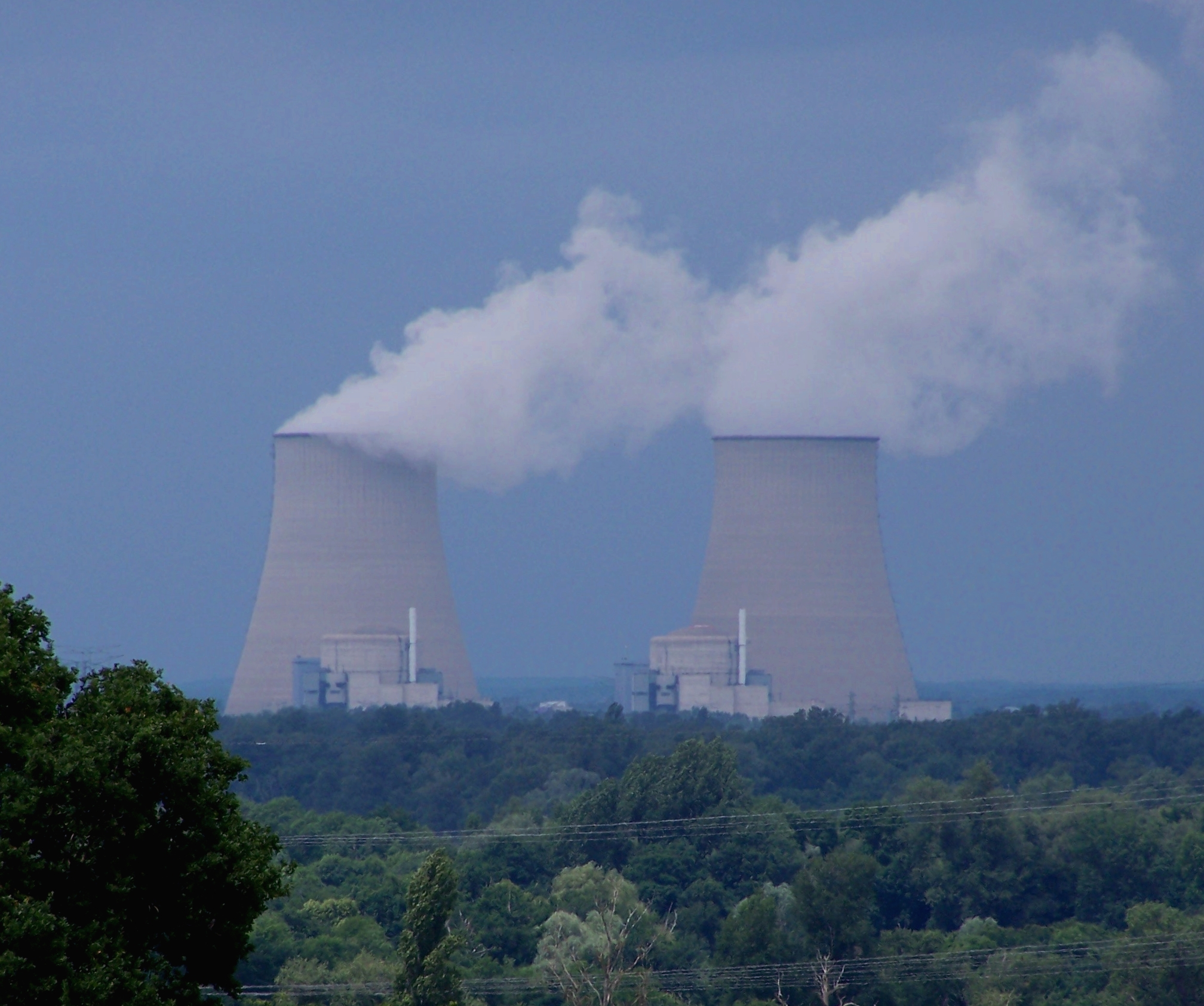 Vue sur la centrale nuclaire de Belleville-sur-Loire (18), depuis Myennes (58)